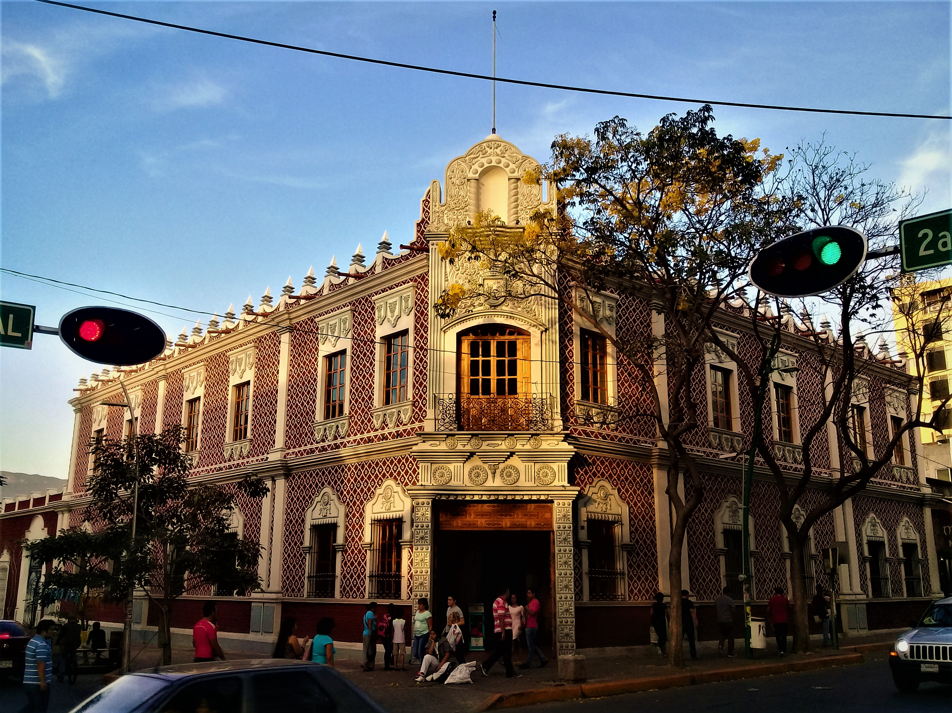 Acceso principal del Museo de la Ciudad de Tuxtla Gutiérrez, Chiapas.